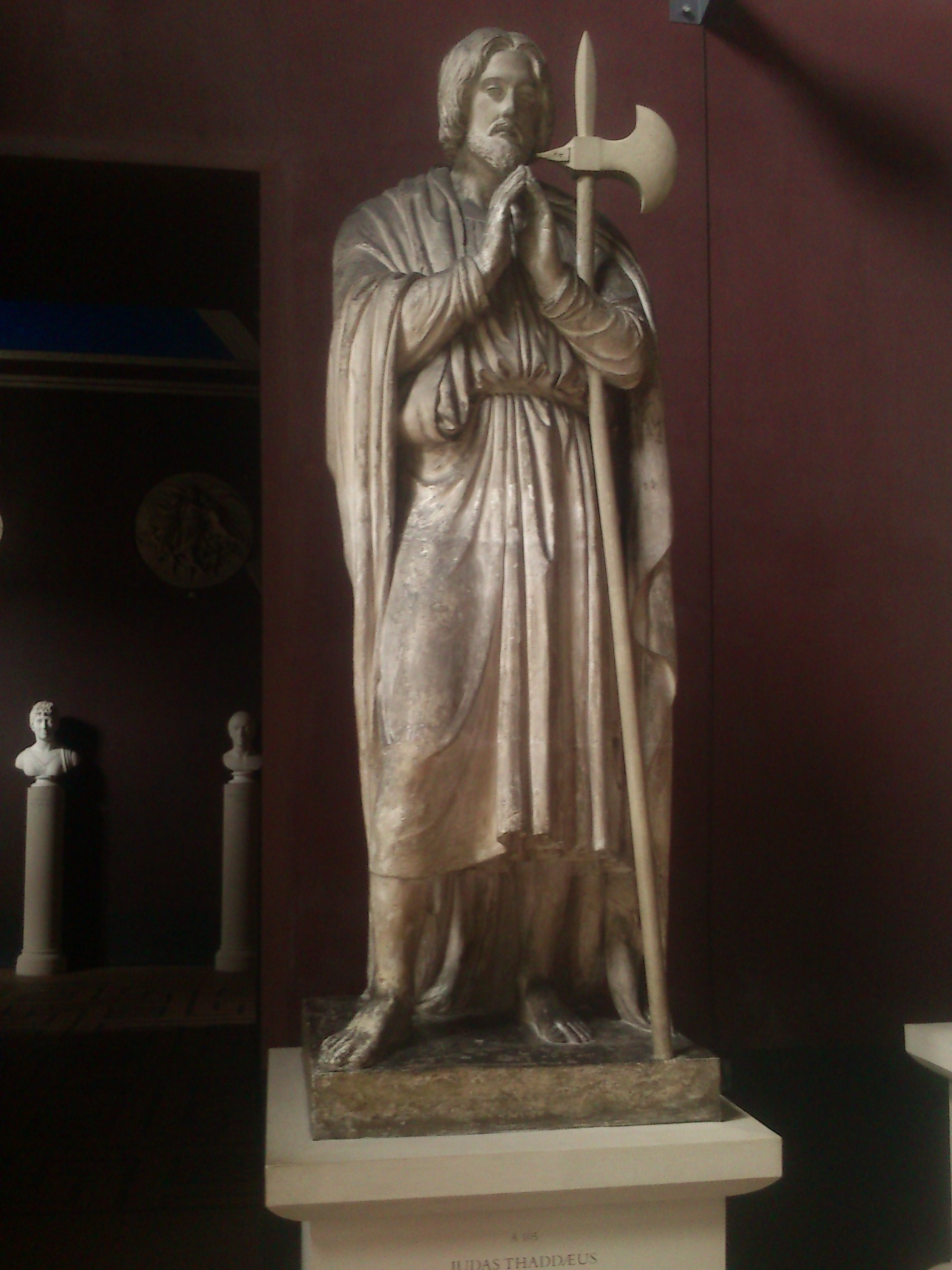 En skulptur lavet af Bertel Thorvaldsen. Judas Thaddæus må ikke forveksles med Judas Iskarot som var en den af Jesus tolv apostle som forrådte ham.